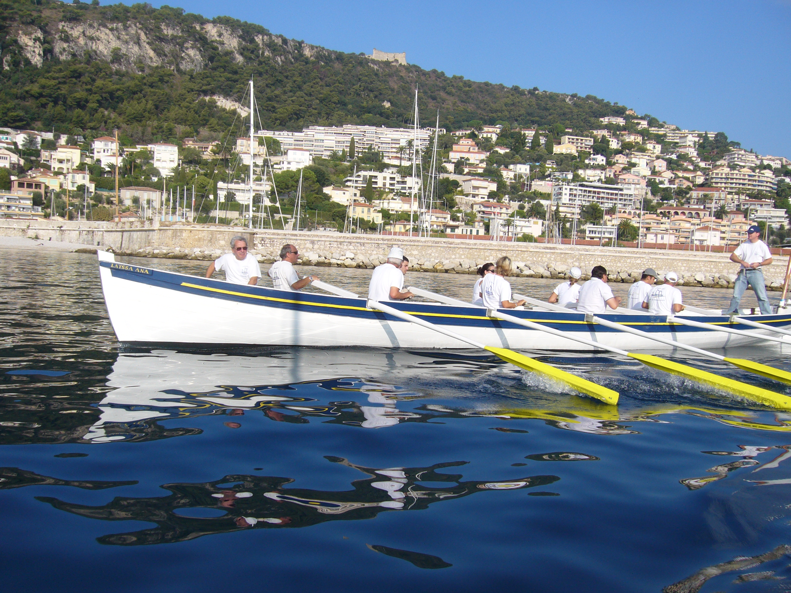 Laïssa, Ana, la yole de Villefranche-sur-Mer, sortant de la Darse à l'aviron pour rejoindre le port de Nice